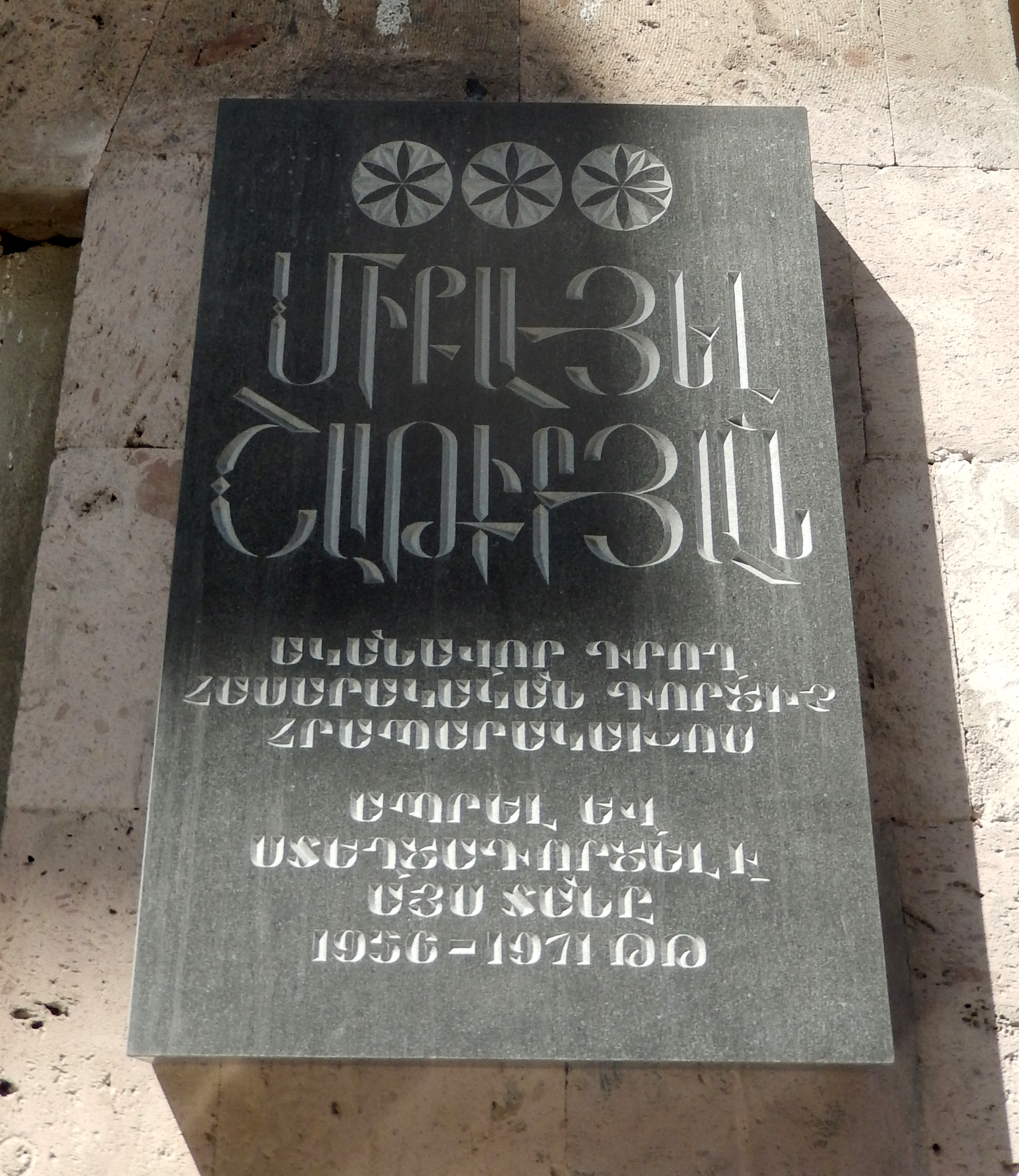 Mikayel Shatiryan's plaque